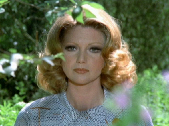 Sylva Koscina in a scene of the film La mala ordina